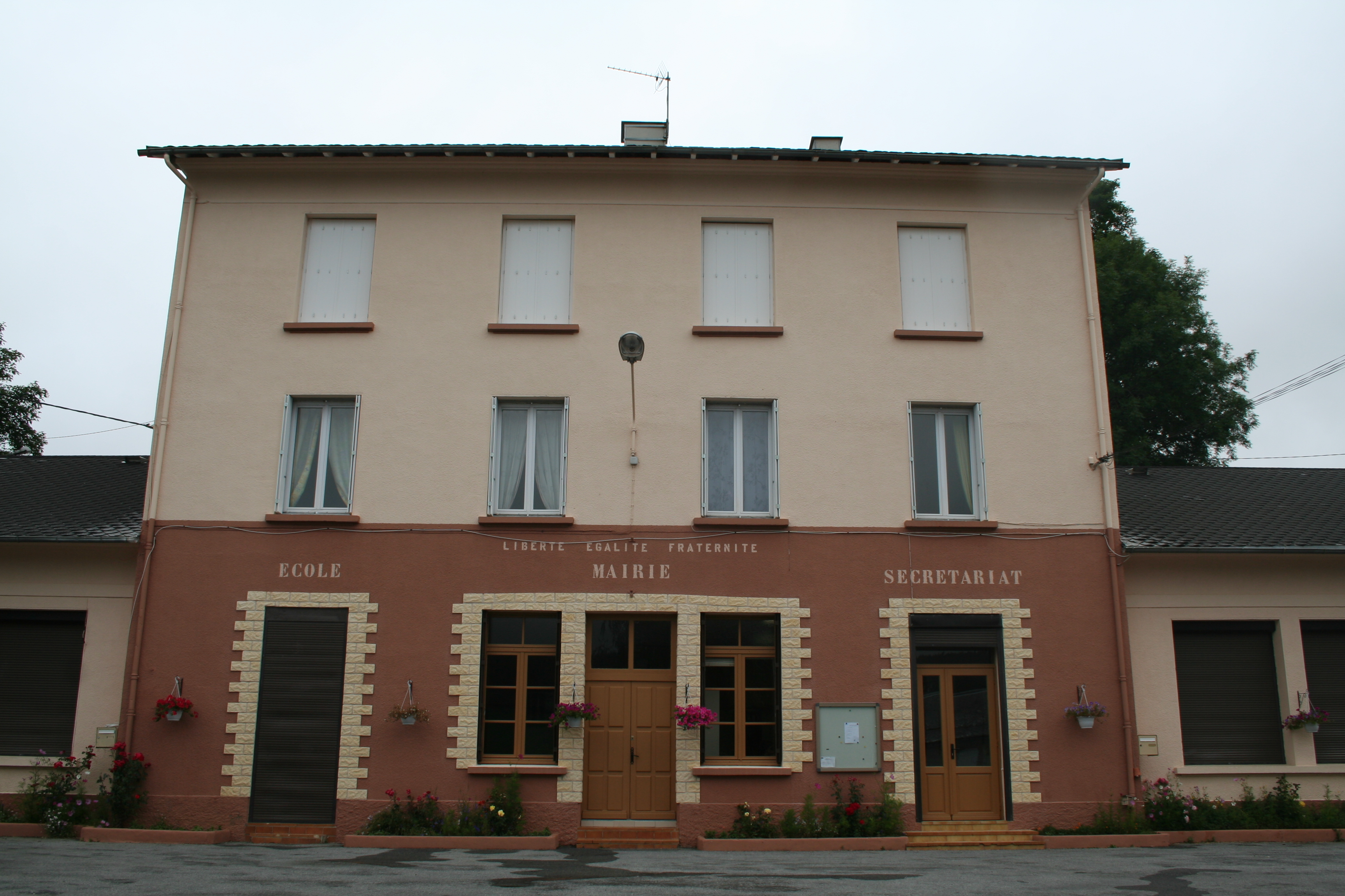 Moulin-Mage (Tarn) - mairie.